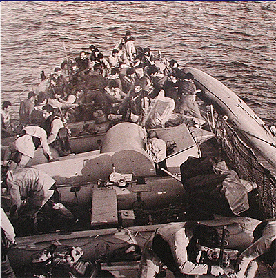 לוחמים וסירות גומי מובלים למבצע ברדס 20 על סיפון ספינת סער